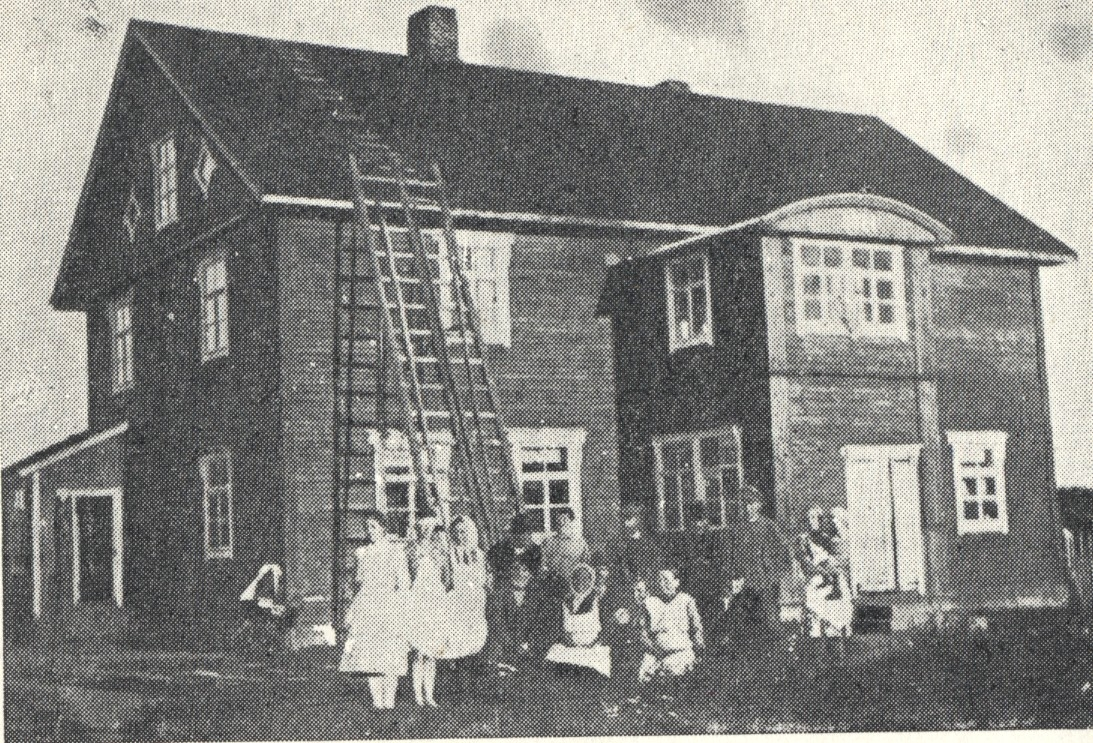 Description